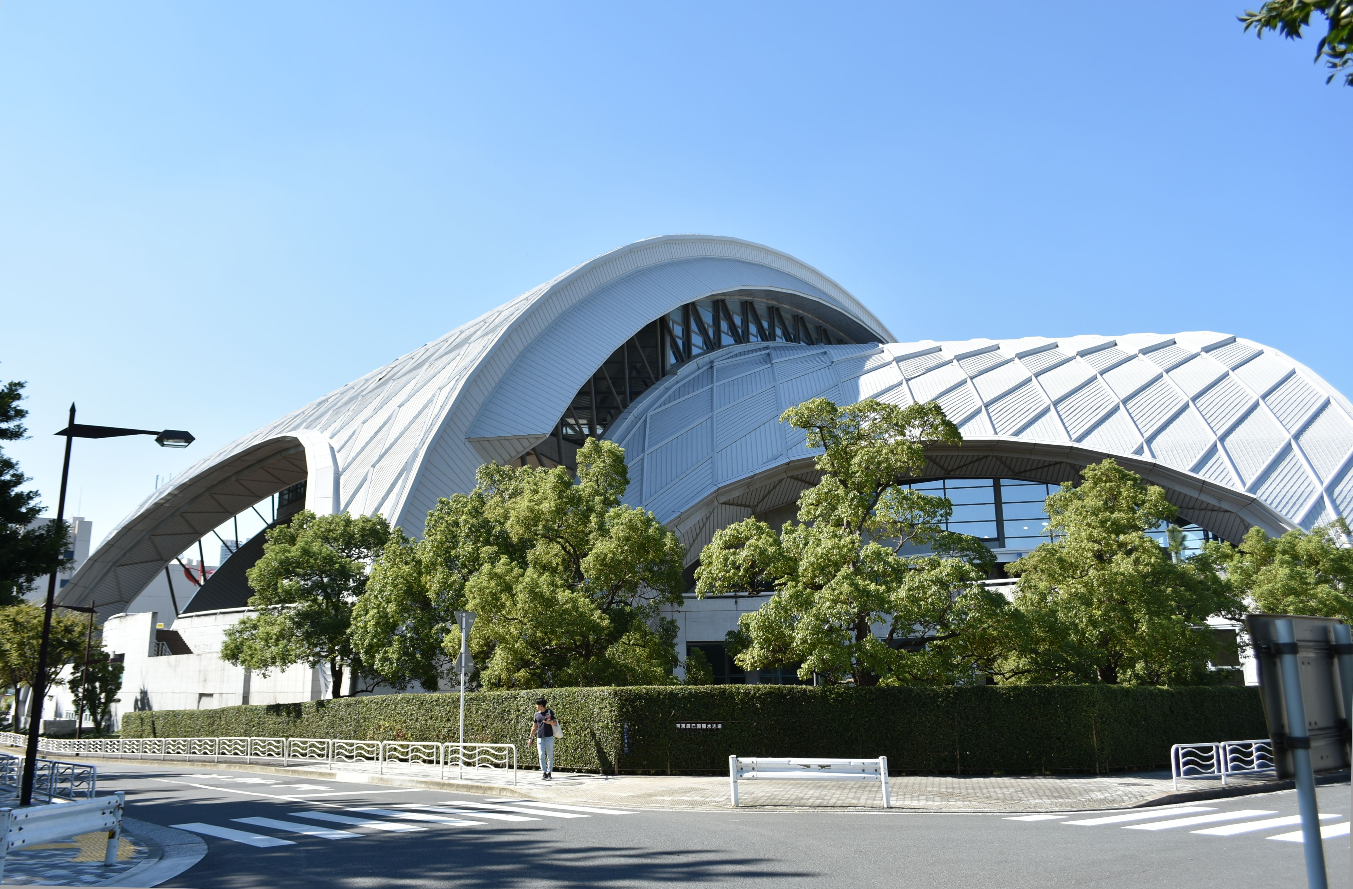 東京辰巳国際水泳場